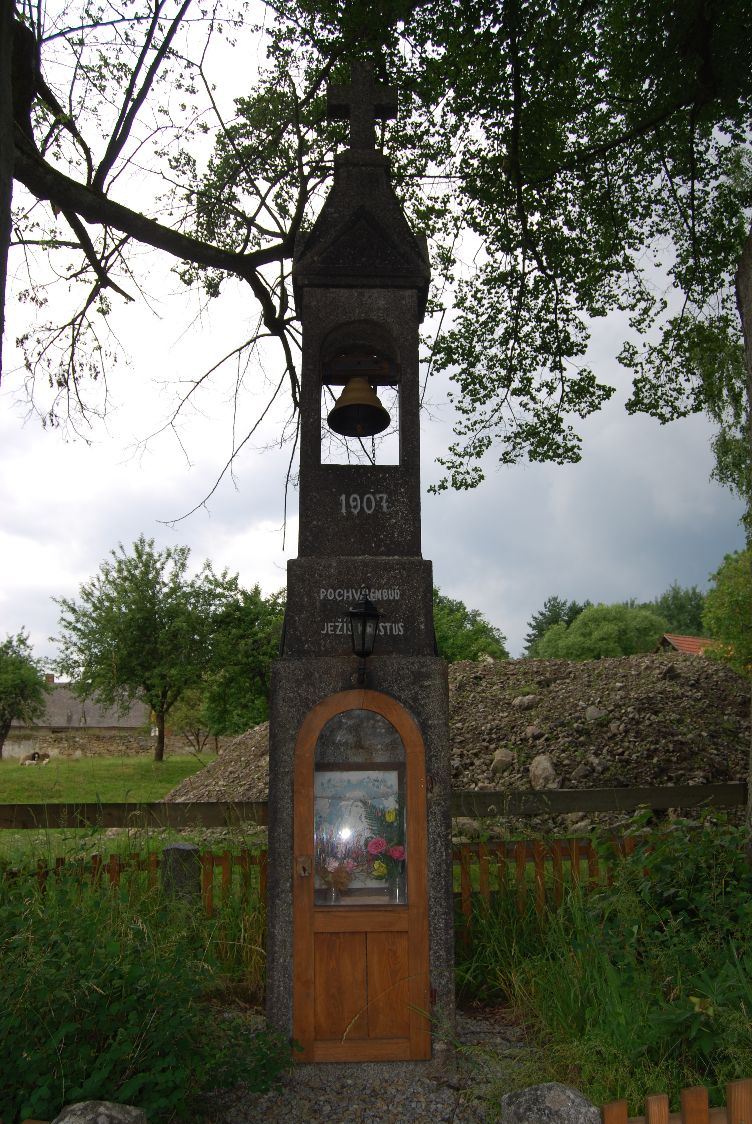 Zvonice v obci. Zvěstonín je část obce Jistebnice v okrese Tábor. Česká republika.